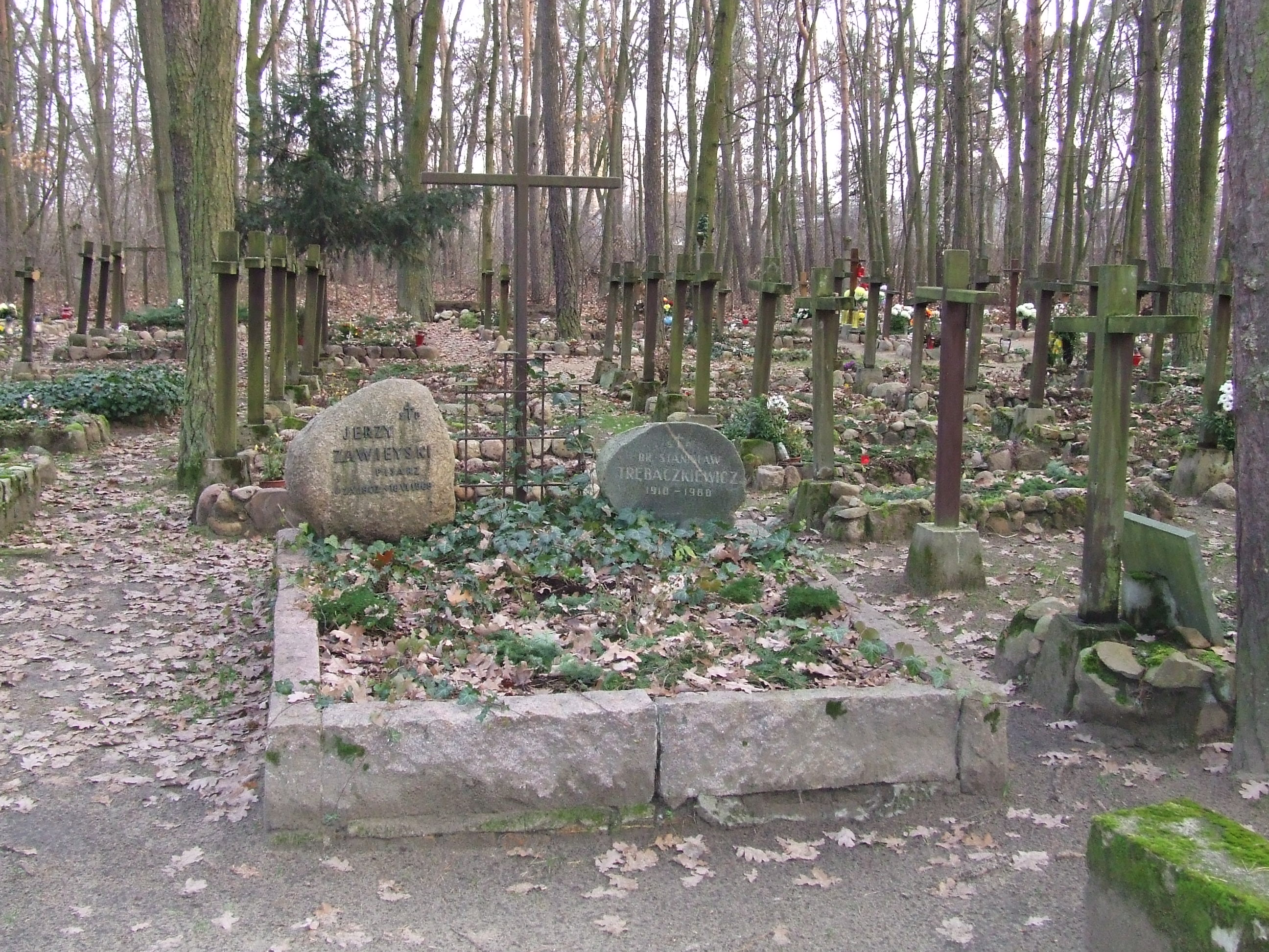 Grób Zawieyskiego, cmentarz leśny, Laski